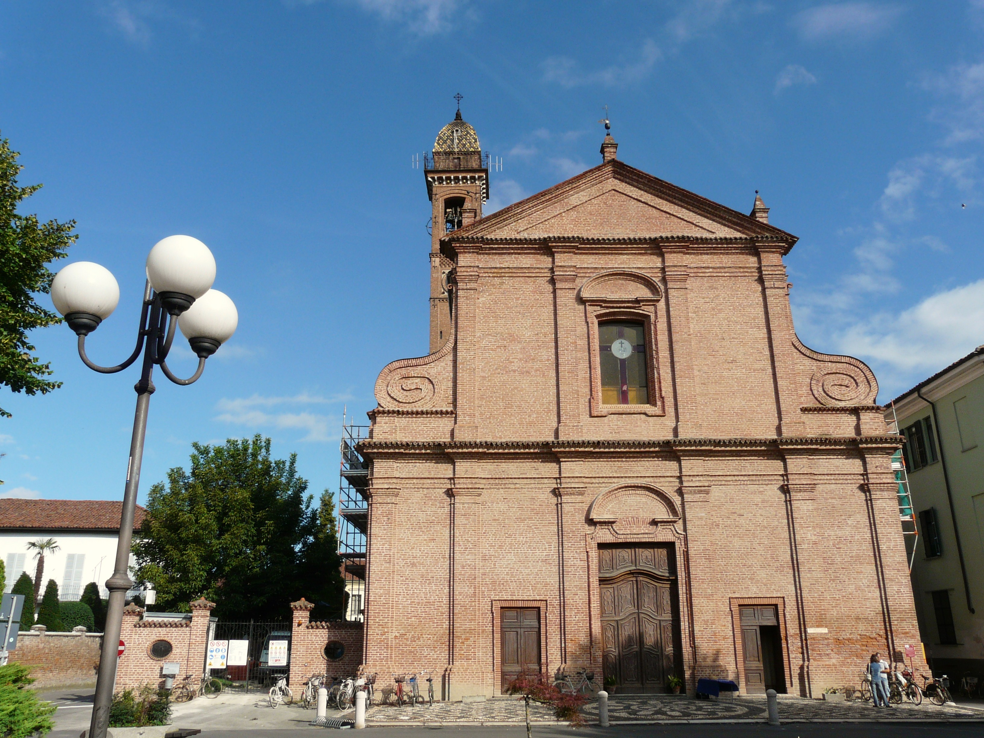 Chiesa dei Santi Carlo e Anna, Castellazzo Bormida, Piemonte, Italia